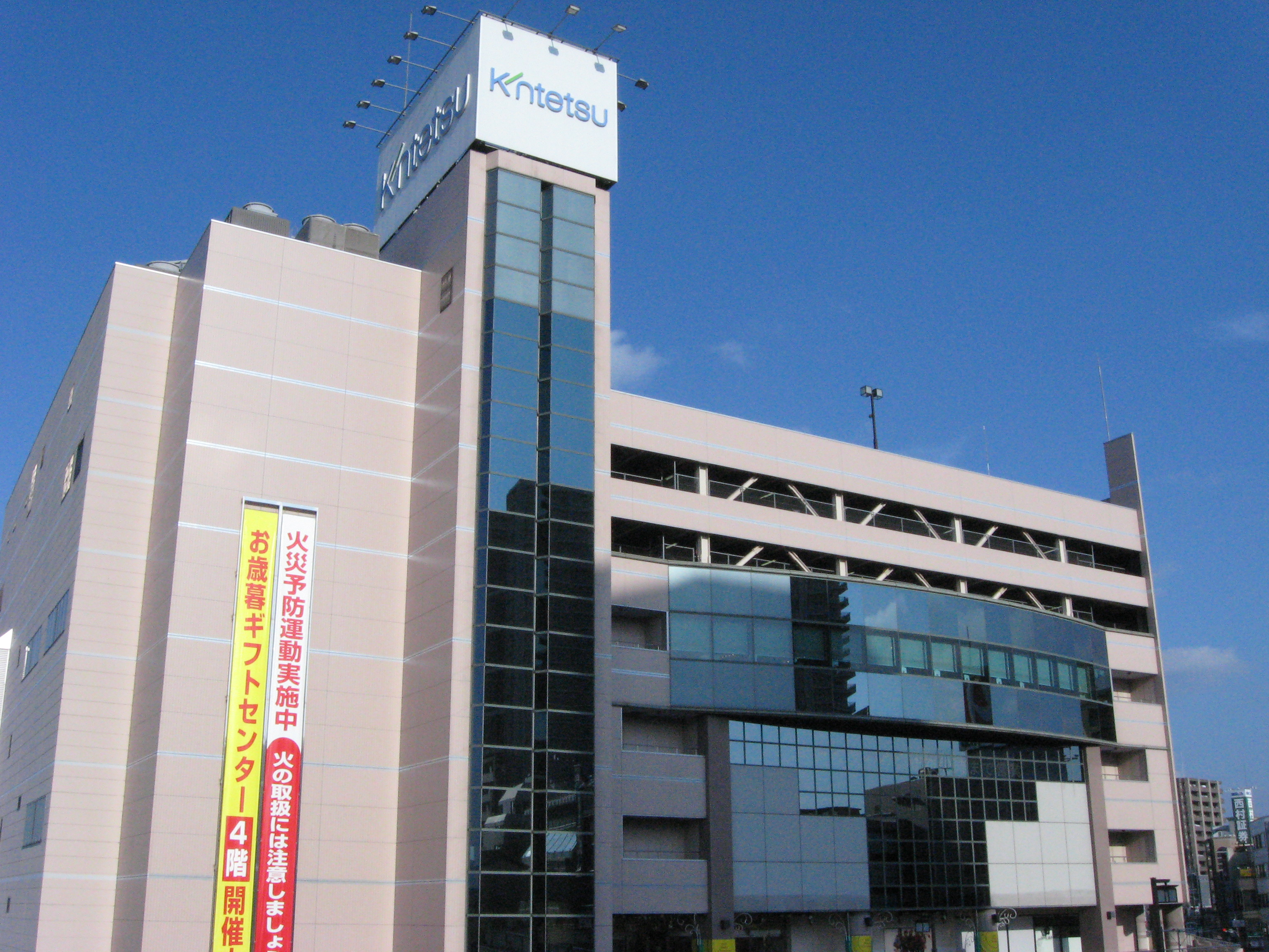 Kusatsu Kintetsu Department Store